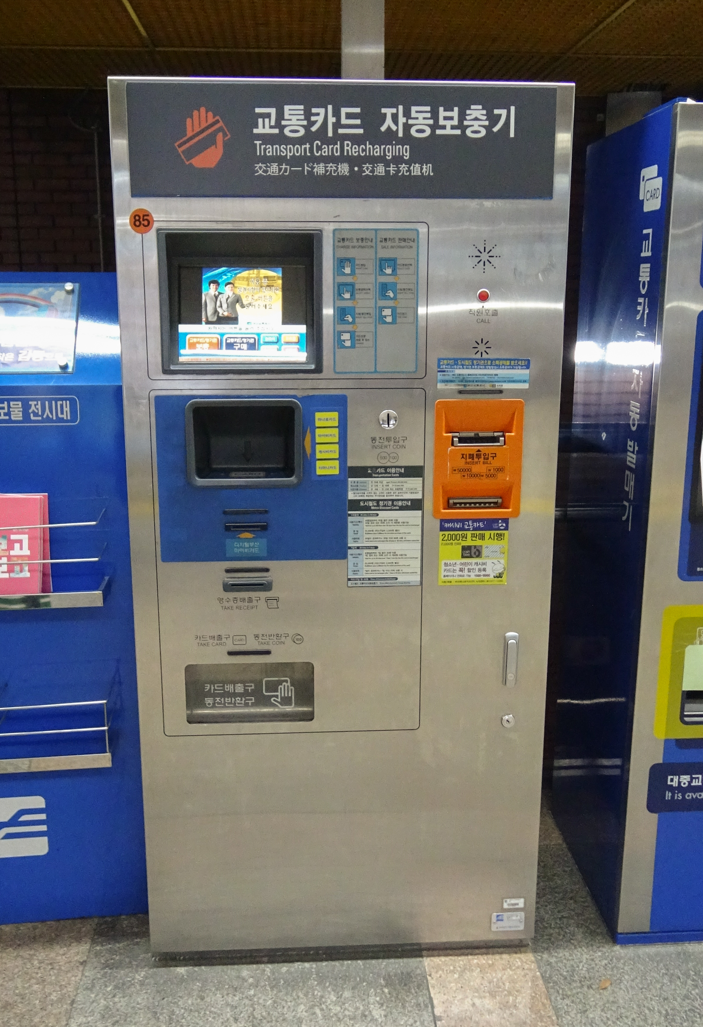 Humetro 交通カード（cashbee）購入・チャージ機 （日本語対応、釜山駅駅）